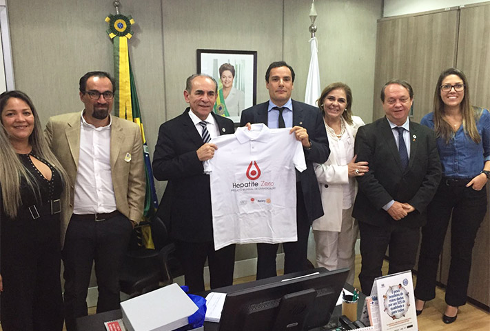 Humberto Silva e Equipe ABPH com o Ex-Ministro da Saúde Marcelo Castro em reunião sobre o Projeto Hepatite Zero.